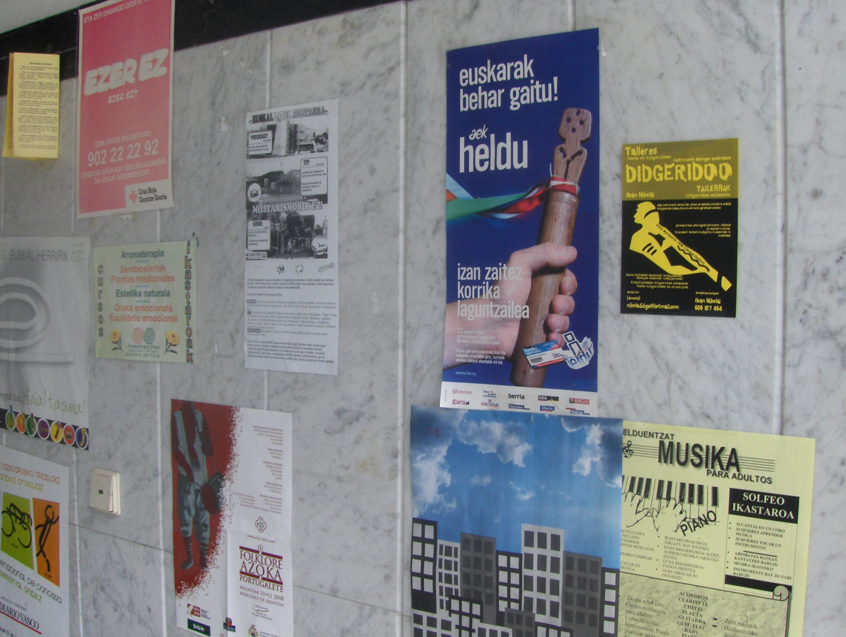 Colección AMARAuna Bilduma 1994 Er. 641 Iturria / Fuente: Mertxe Mardaras Informazio gehiago / Más información: Amarako Ernest Lluch Kultur Etxeko Liburutegia / Biblioteca del Centro Cultural Ernest Lluch de Amara (Donostia-San Sebastián). Korrika, popular relay race in support of the Basque language across Donostia-San Sebastián